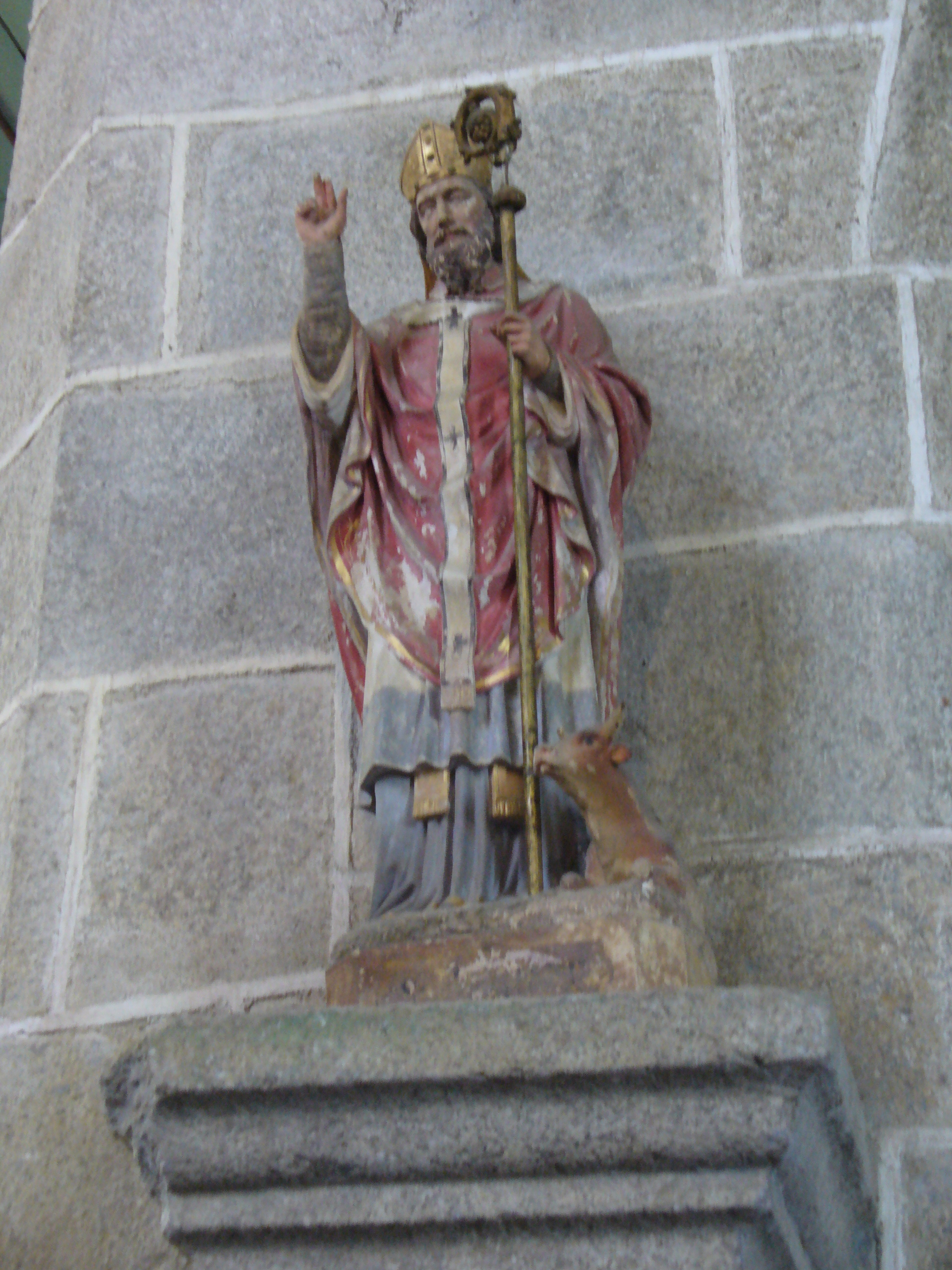 Statue des Heiligen Saint Herbot -Saint Hervé mit Wolf-Berühmter Bretonischer Heiliger des 6.Jahrhunderts-Saint Miliau-Guimiliau